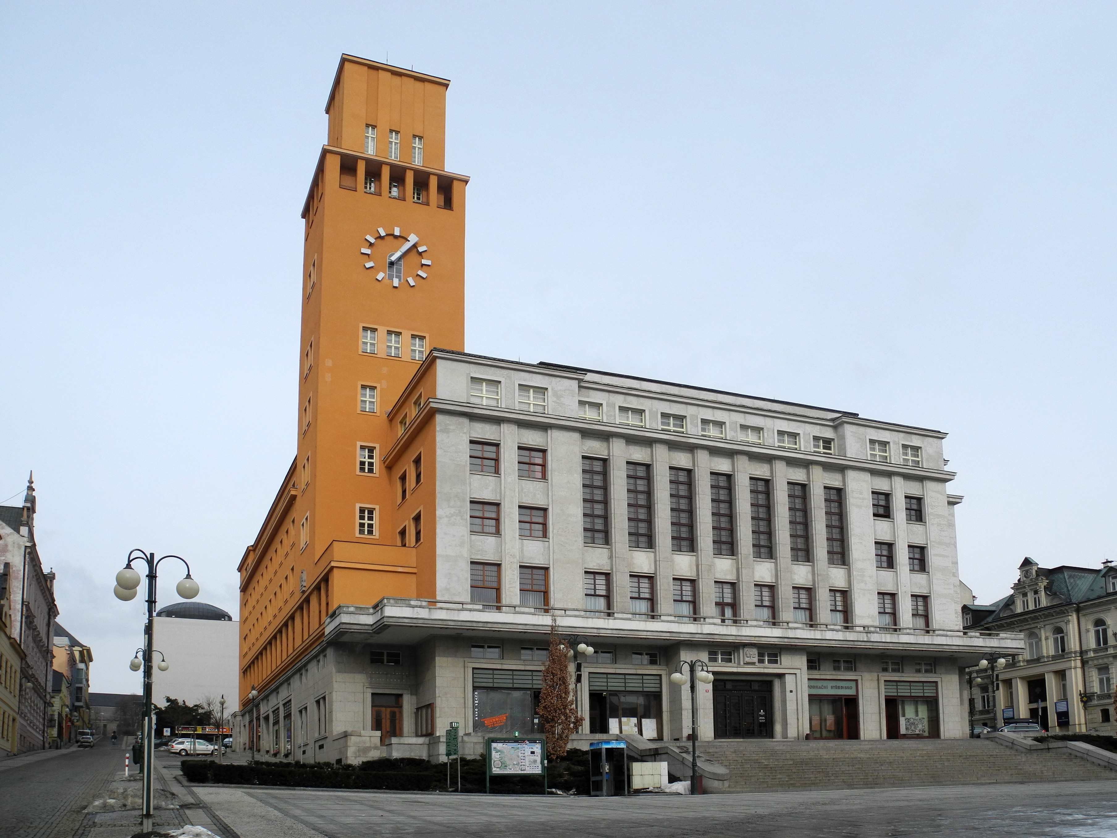 Neues Rathaus in Gablonz an der Neiße - Jablonec nad Nisou, Mírové nám. 3100/19. Architekt: Karl Winter (1930–1933).